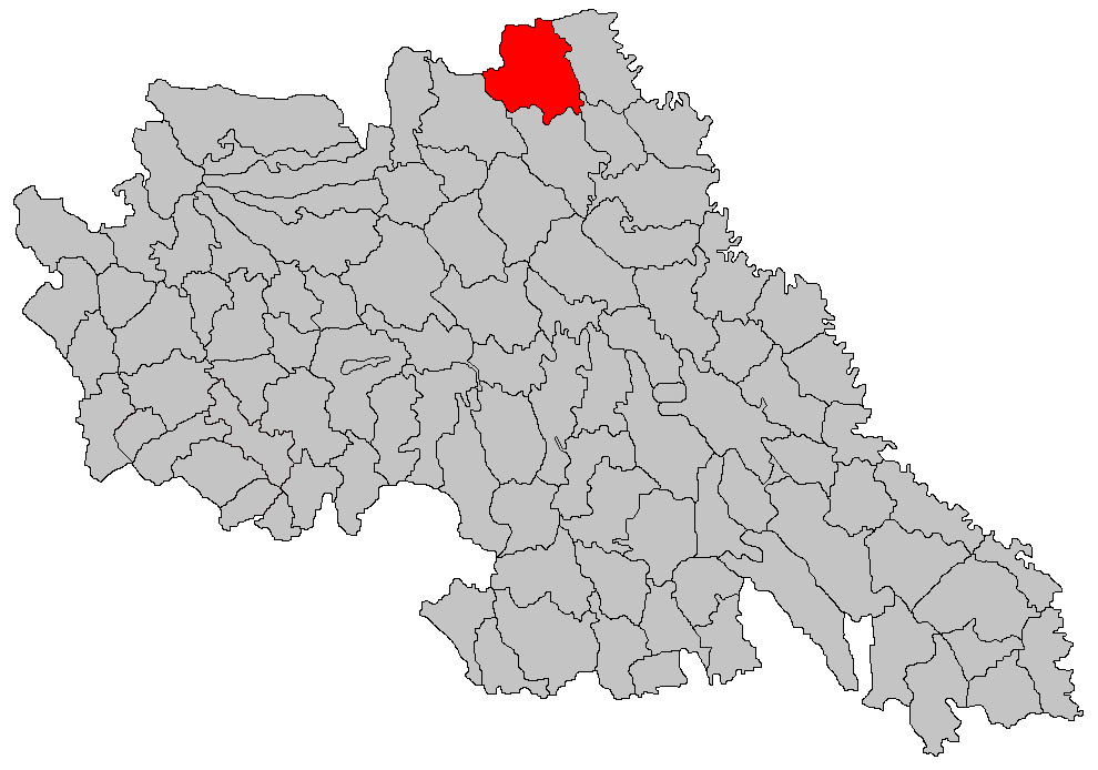 Categorie:Hărţi ale judeţului Iaşi